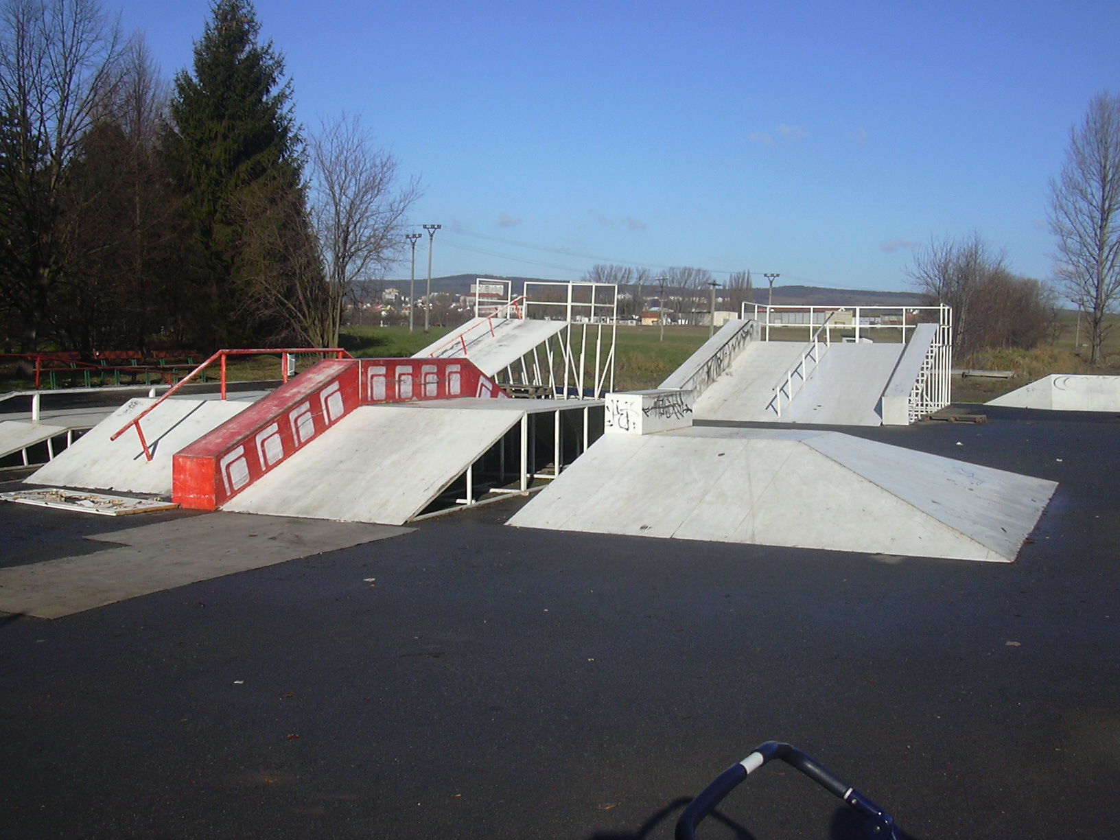 Skatepark (Vyškov- czech republic)